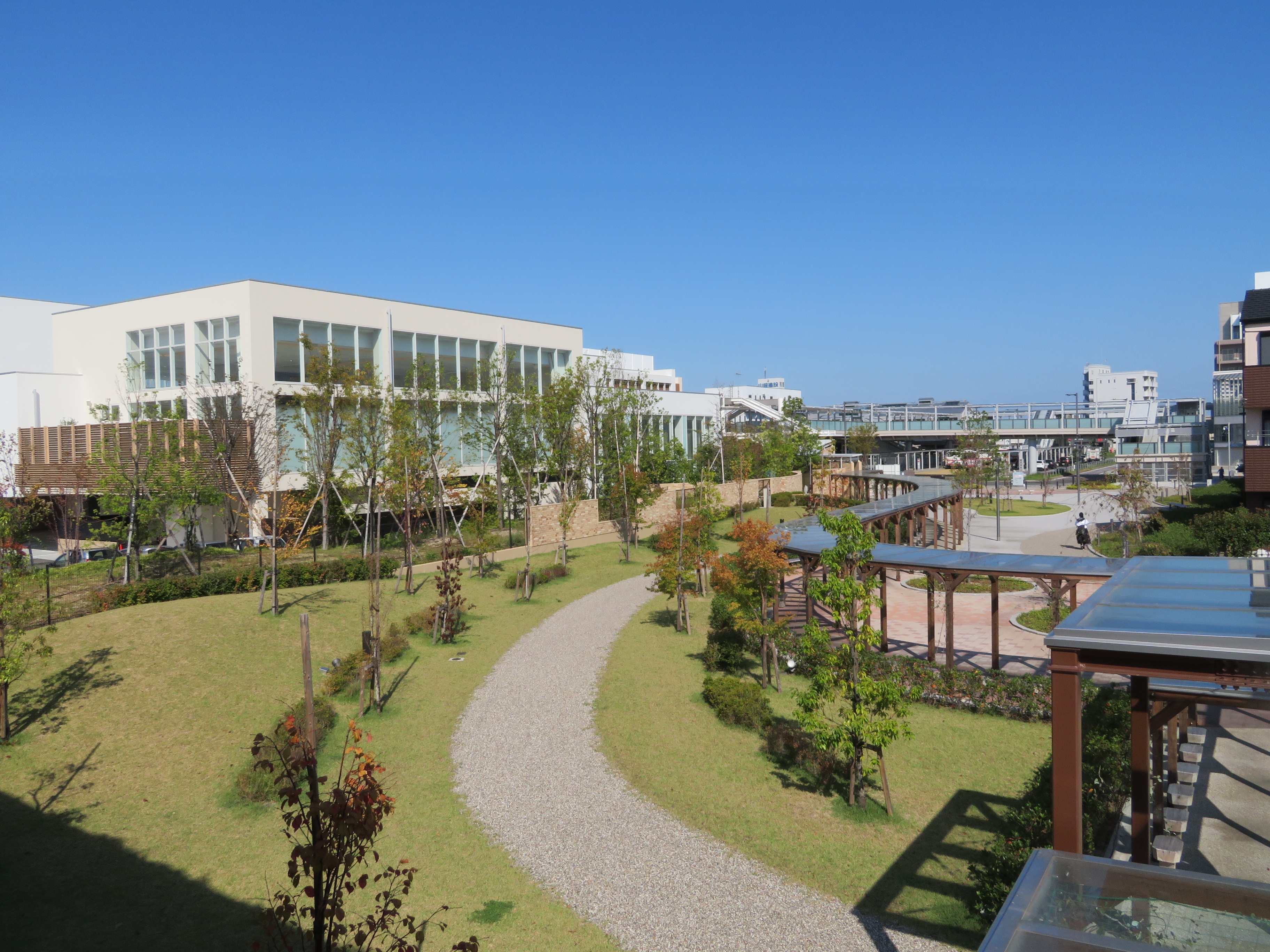 ララシャンスOKAZAKI迎賓館、出会いの杜公園（岡崎市柱町）